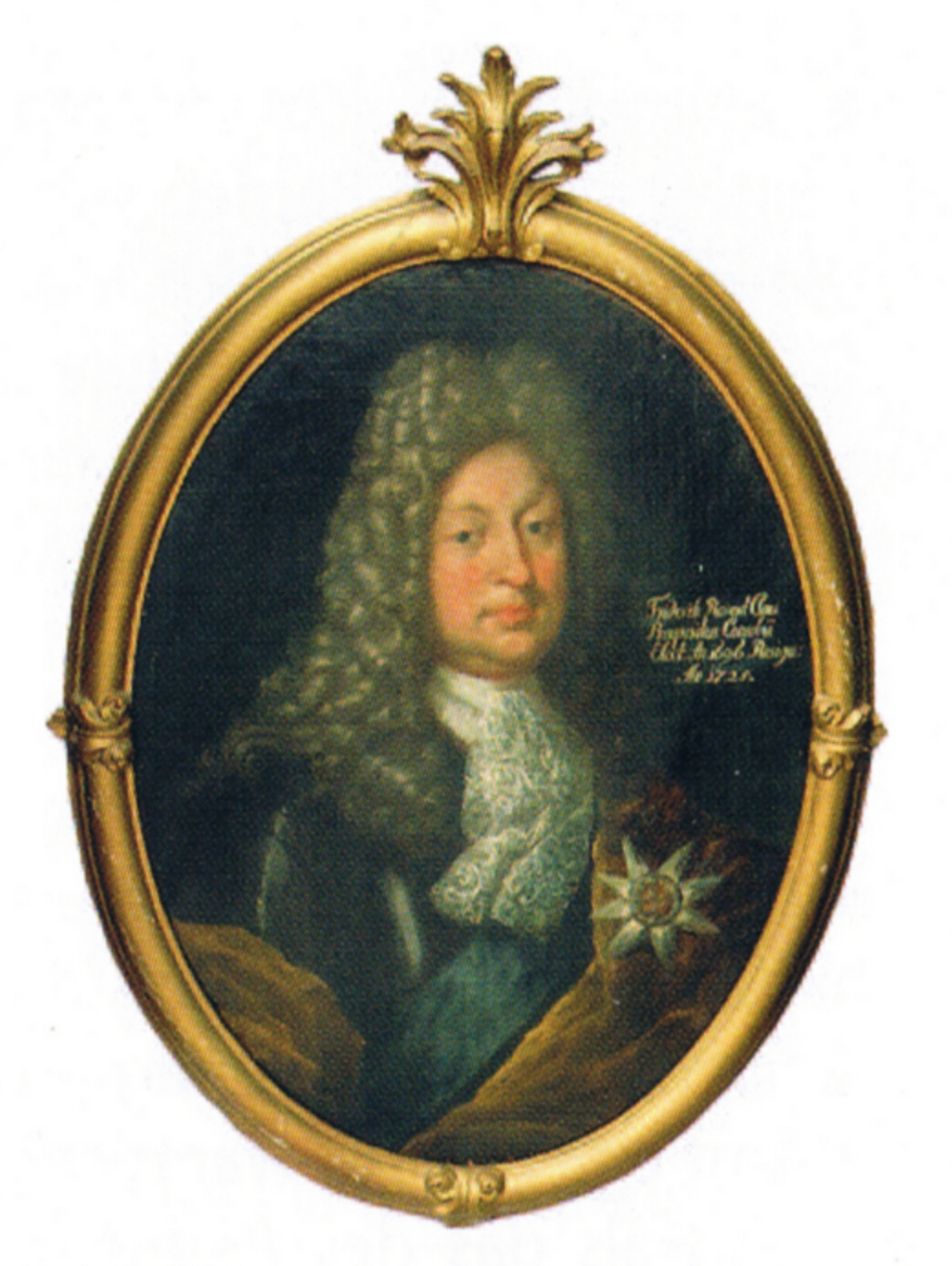 Friedrich von Reventlow (1649-1728), Geheimer Etats- und Landrat, Herr auf Neuendorf und Klosterprobst von Uetersen. Träger des Elefantenordens.